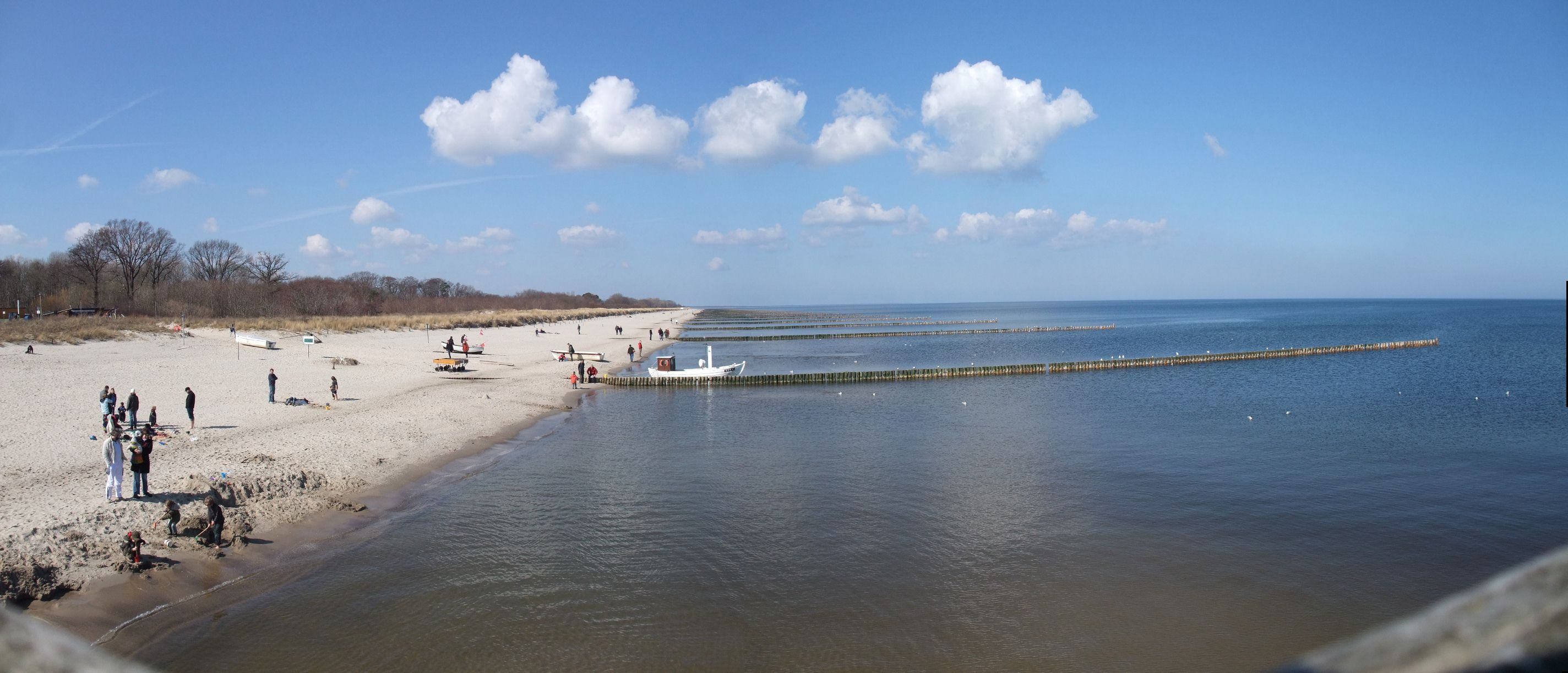 Blick von der Seebrück Koserow, Deutschland, nach Nordnordwest.